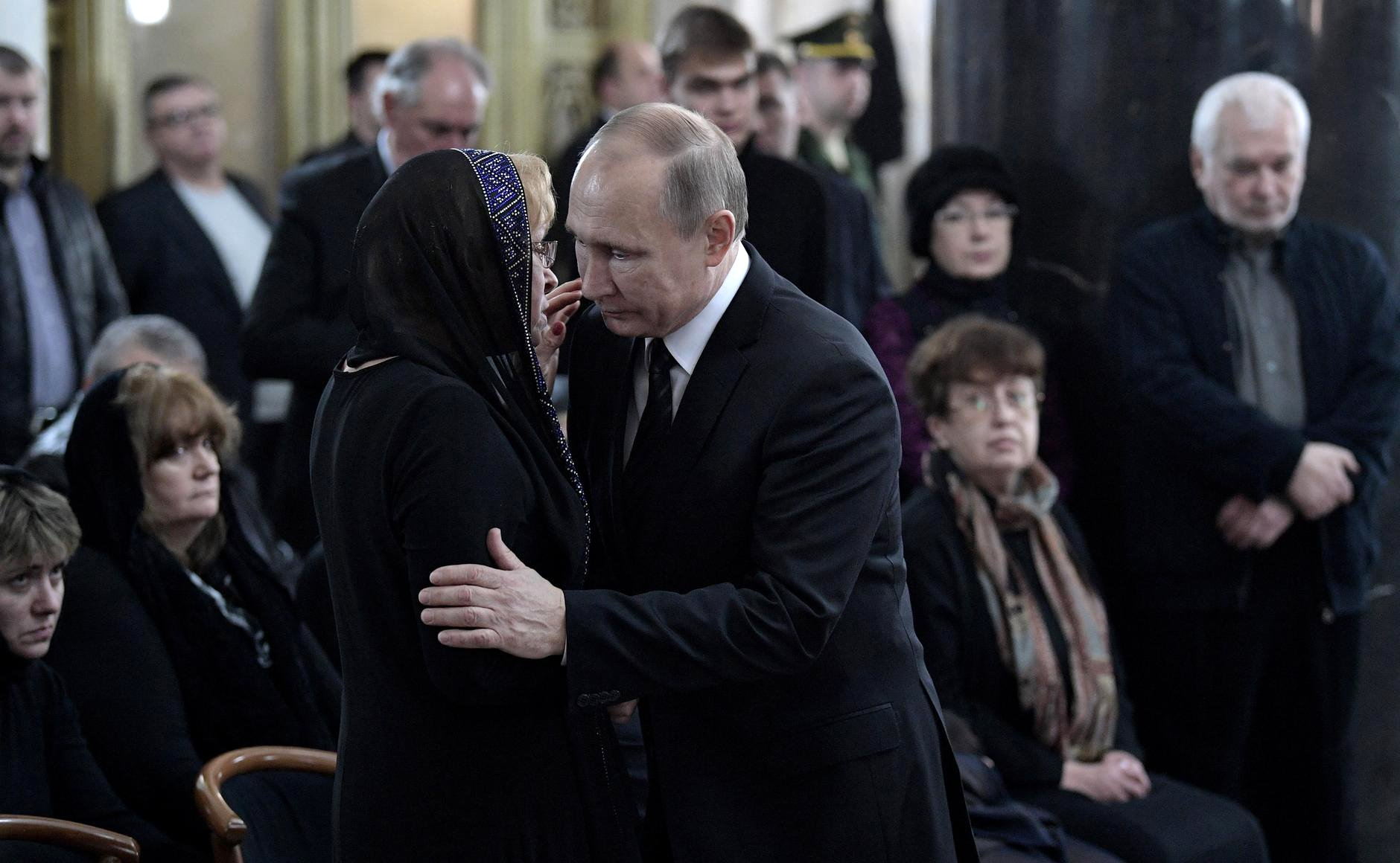 Президент России Владимир Путин с Мариной Карловой, вдовой посла Российской Федерации в Турции, трагически погибшего 19 декабря в Анкаре в результате террористического акта